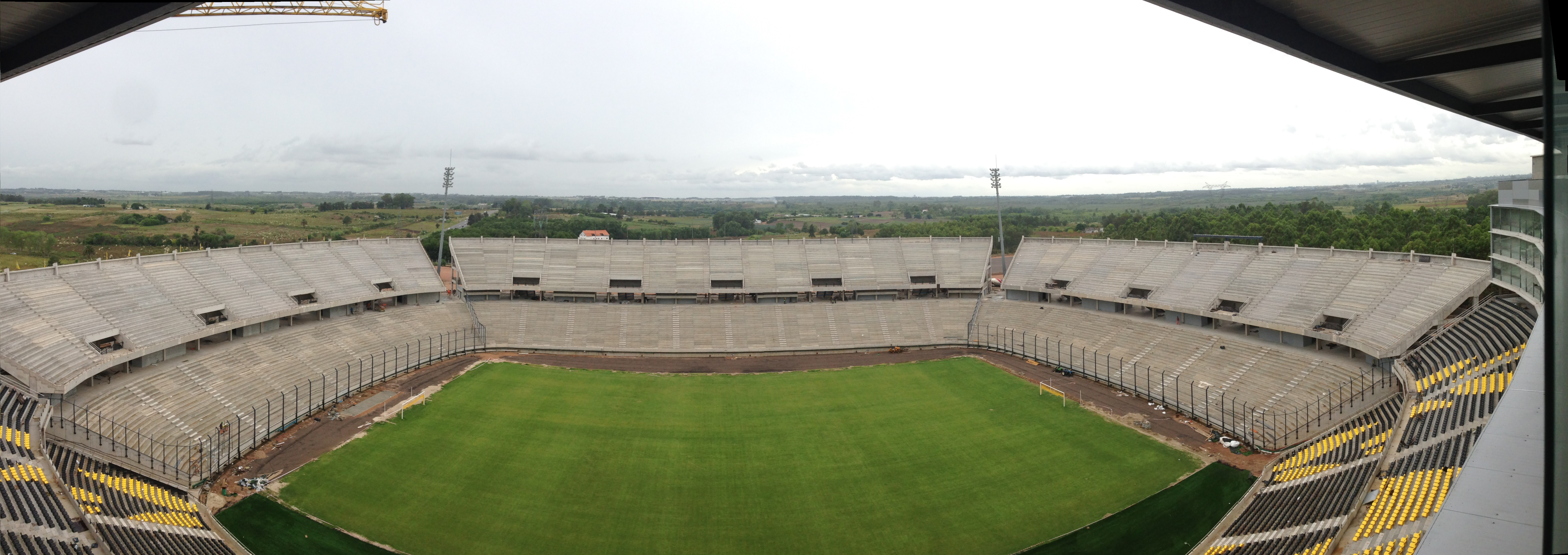 Estadio del Club Atlético Peñarol. Arquitecto Luis Rodríguez Tellado. Ubicación Ruta 102 (Ruta Nacional Perimetral Wilson Ferreira), Camino Manganga y Camino de los Siete Cerros, Montevideo, Uruguay. Vista del estadio desde la cabina de prensa de la tribuna Frank Henderson (norte). Desde esta ubicación se observa el Aeropuerto Internacional de Carrasco General Cesáreo Berisso detrás de la tribuna José Pedro Damiani (sur).